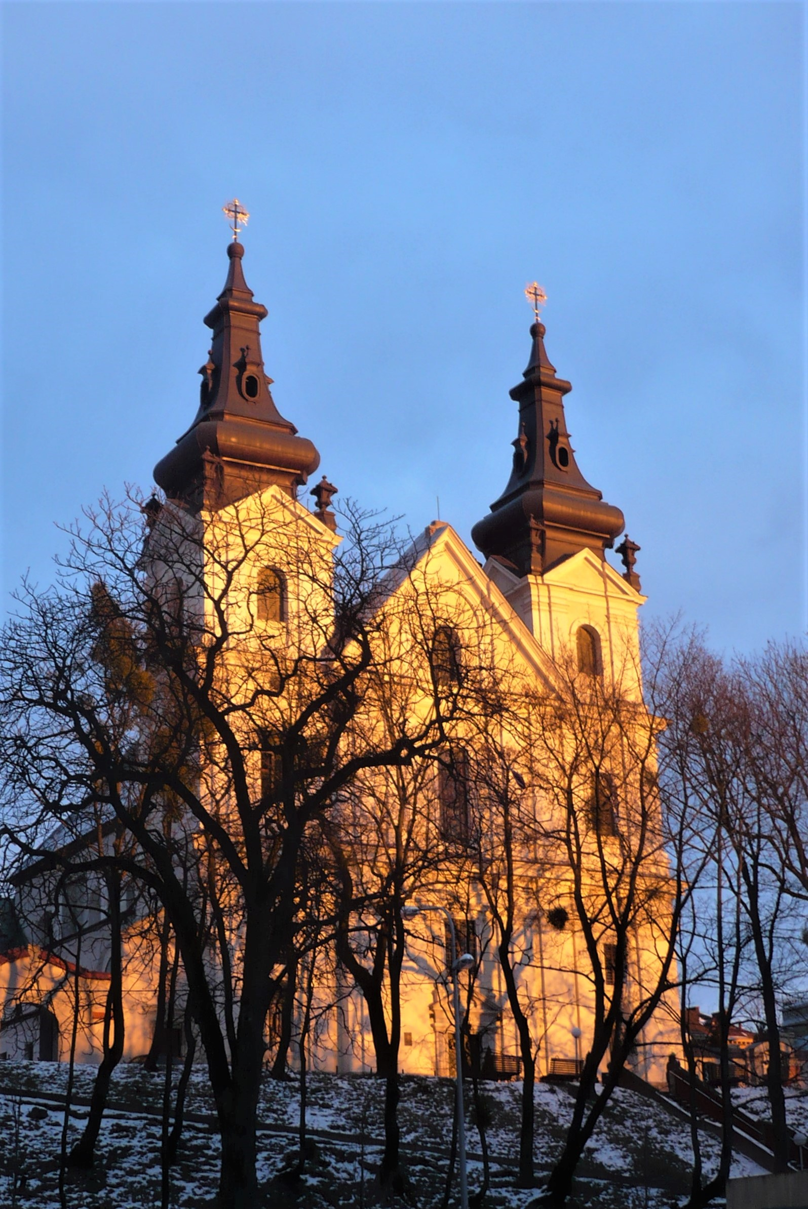 Kościół karmelitów